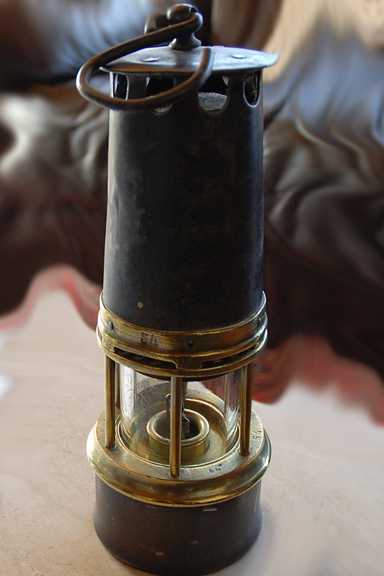 lamp gebruikt door mijnwerkers om methaangas te detecteren